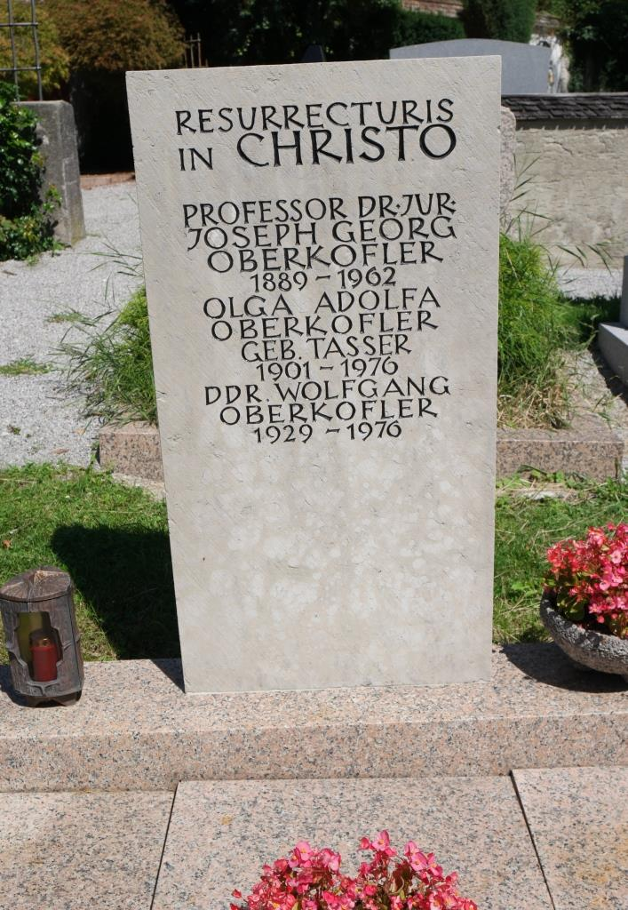 Grab des Erzählers und Lyrikers Joseph Georg Oberkofler (1889-1962) auf dem Friedhof Innsbruck-Mühlau